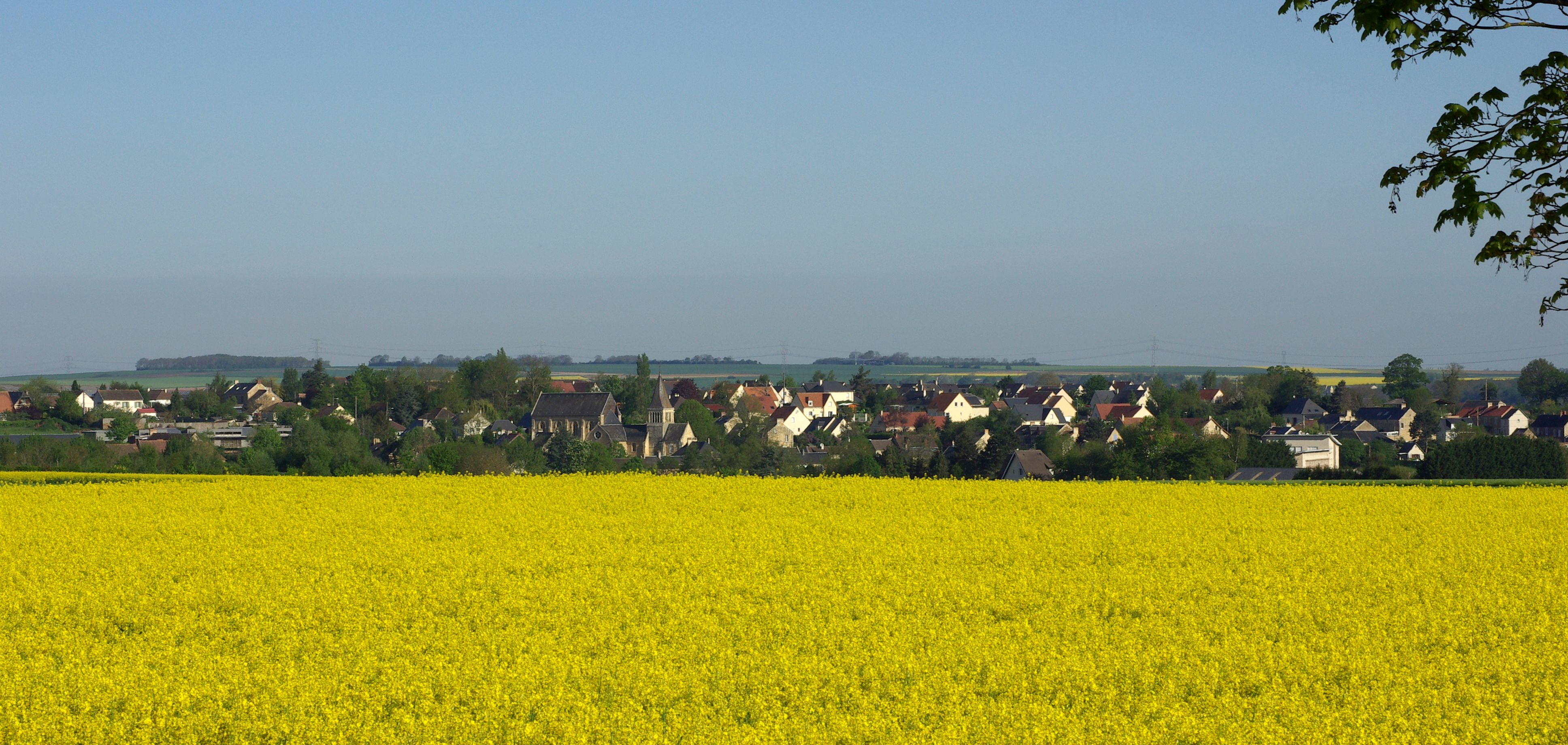 Une vue du bourg de Clinchamps-sur-Orne dans le Calvados.